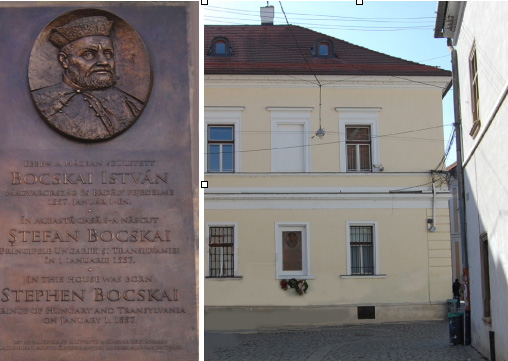 Bocskai-emléktábla a kolozsvári Bocskai-házon